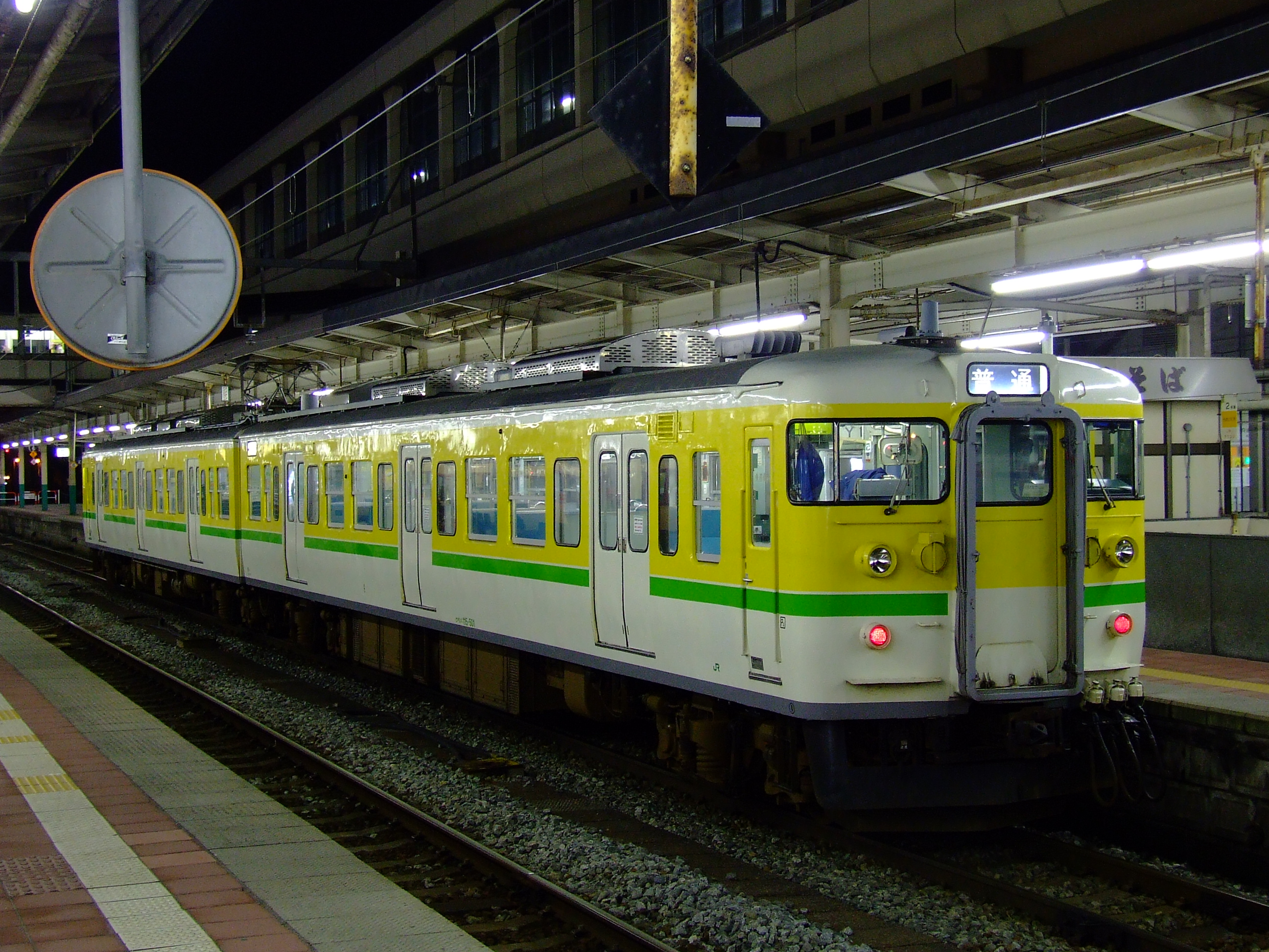 JR東日本新潟支社の115系電車（弥彦色とよばれる塗装） 新潟駅にて